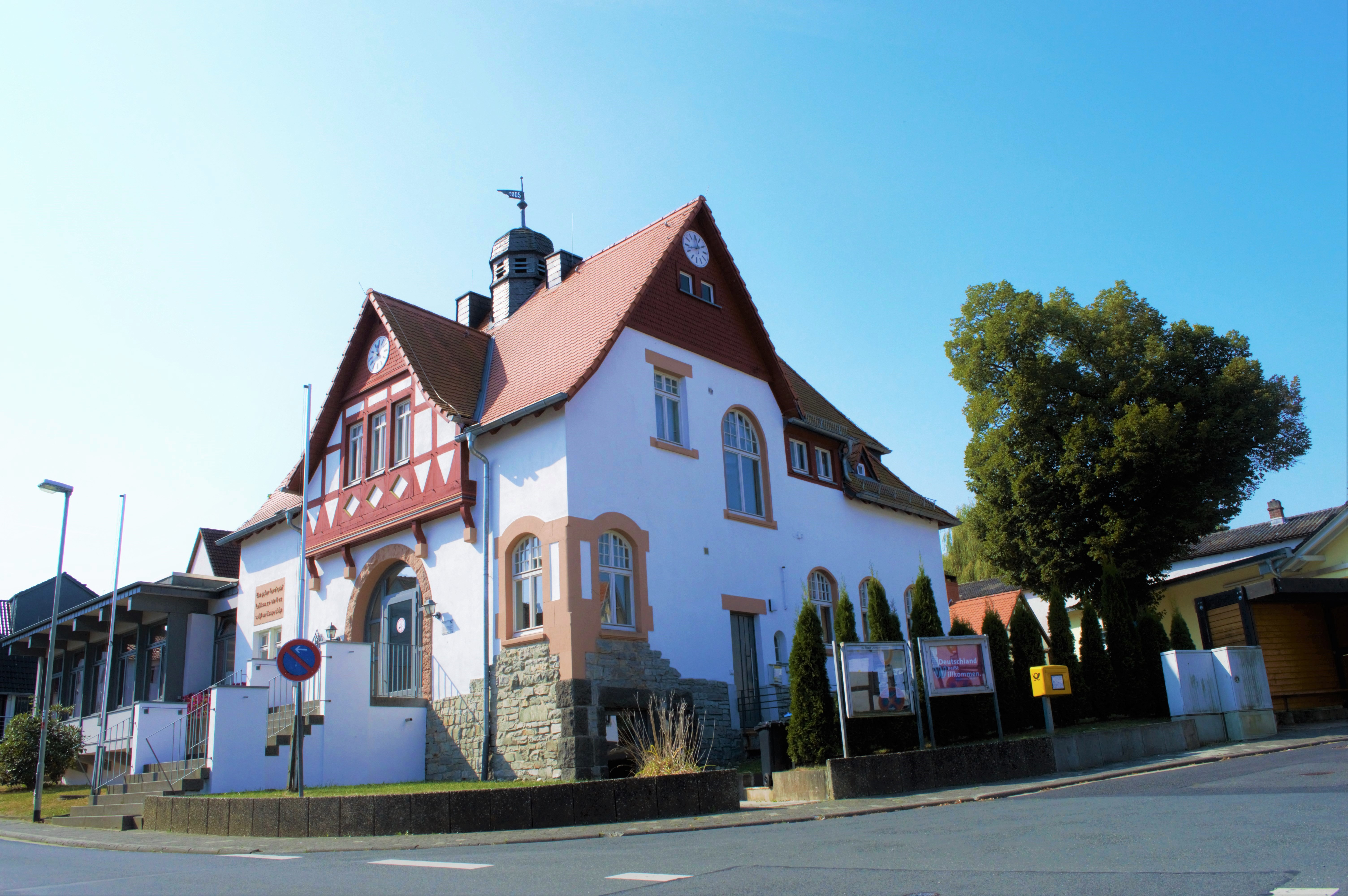 1905 für einklassigen Betrieb erbaute Schule mit Lehrerwohnung